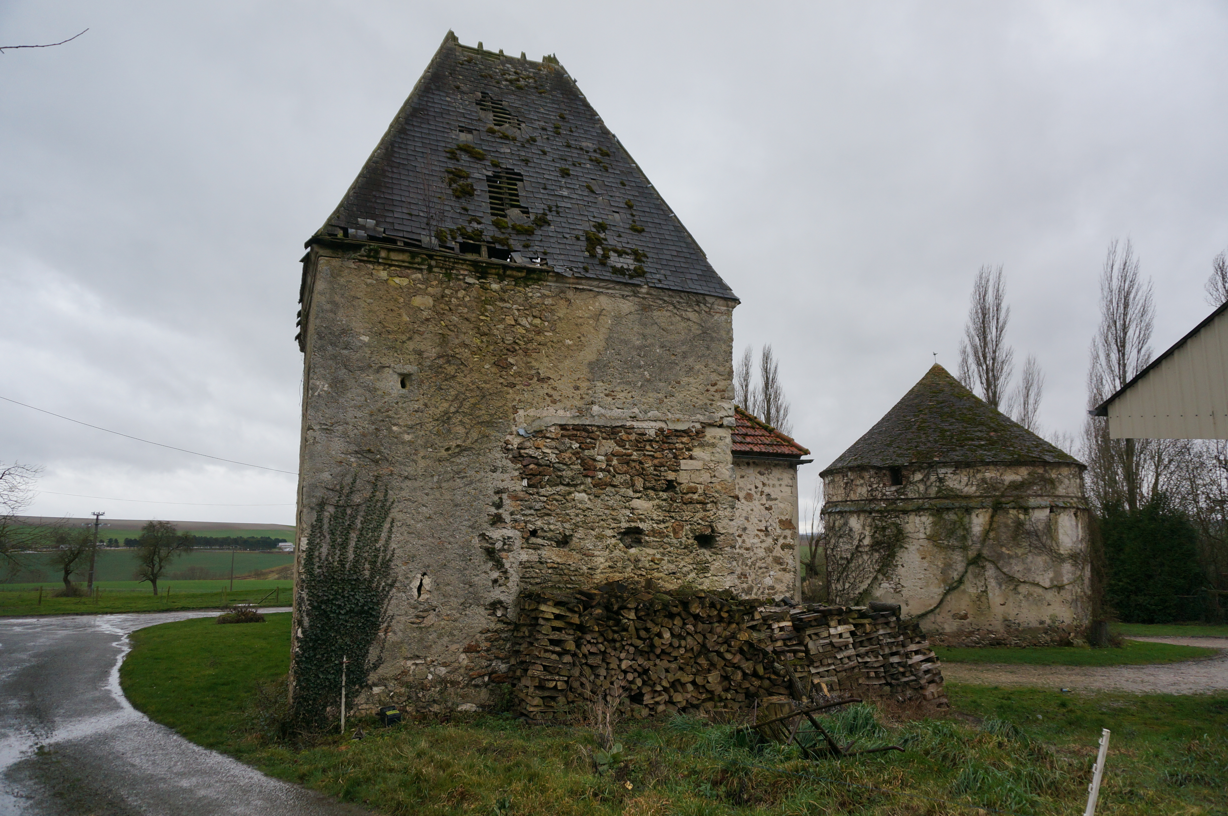 Villers-Agron-Aiguizy, moulin de la ferme de Forzy.